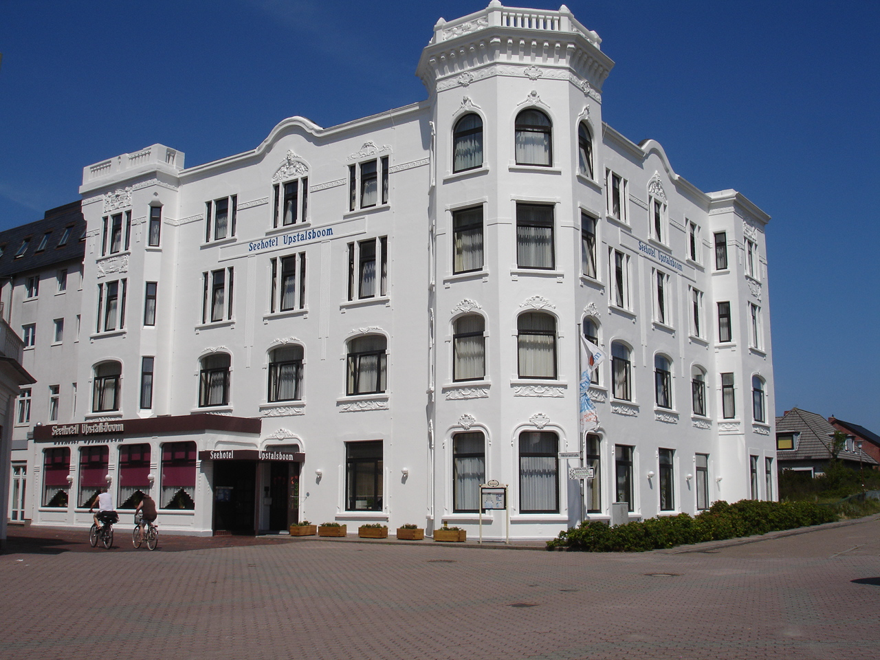 Hotel Upstalbeam